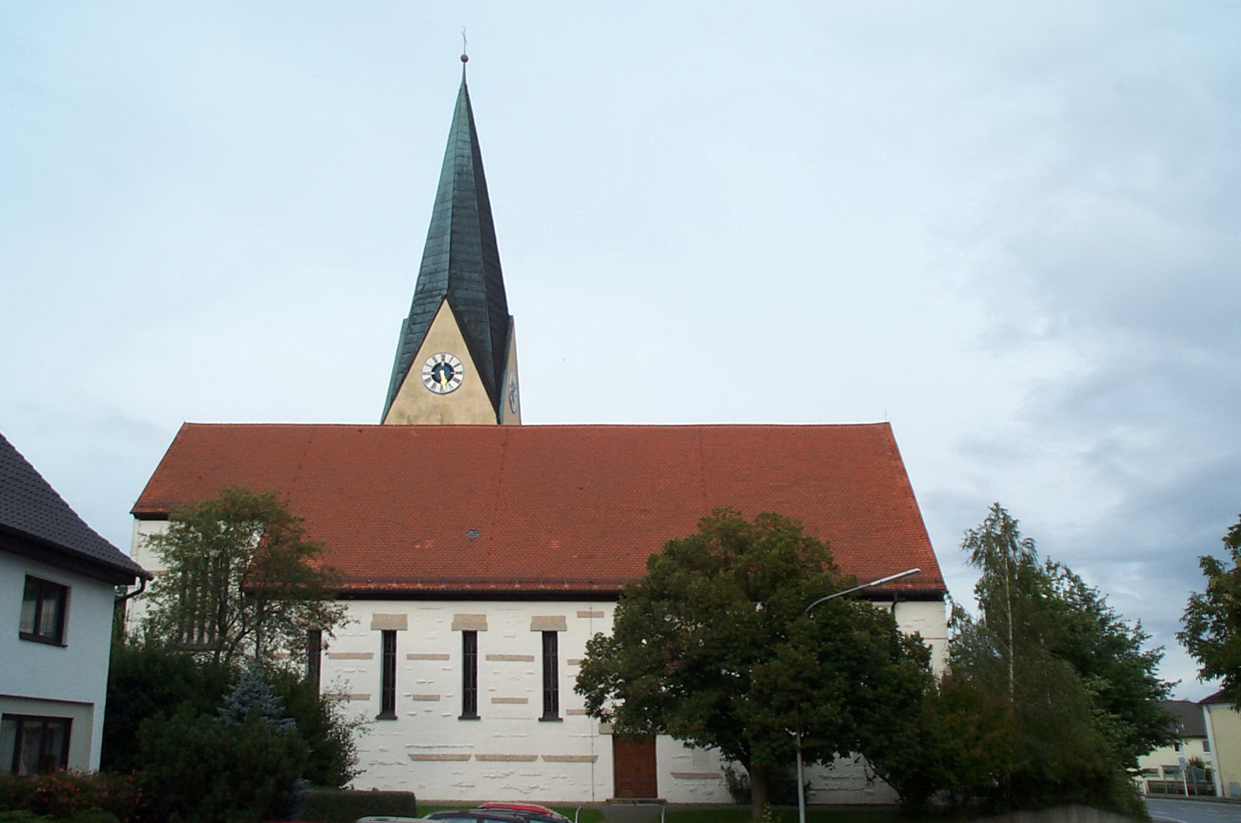 Pfakofen. Katholische Pfarrkirche St. Georg, Saalbau mit eingezogenem Chor und Flankenturm, Rauputz mit Bankziegel und Natursteinstreifen, Neue Sachlichkeit, 1929, Turm mittelalterlich, Sakristei barock, an der Außenwand Grabmäler derer von Königsfeld, 1601 und 1629; mit Ausstattung.